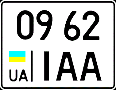 Автомобильный номер (задний) юридических лиц Украины и мотоциклов, стандарт 1993 года